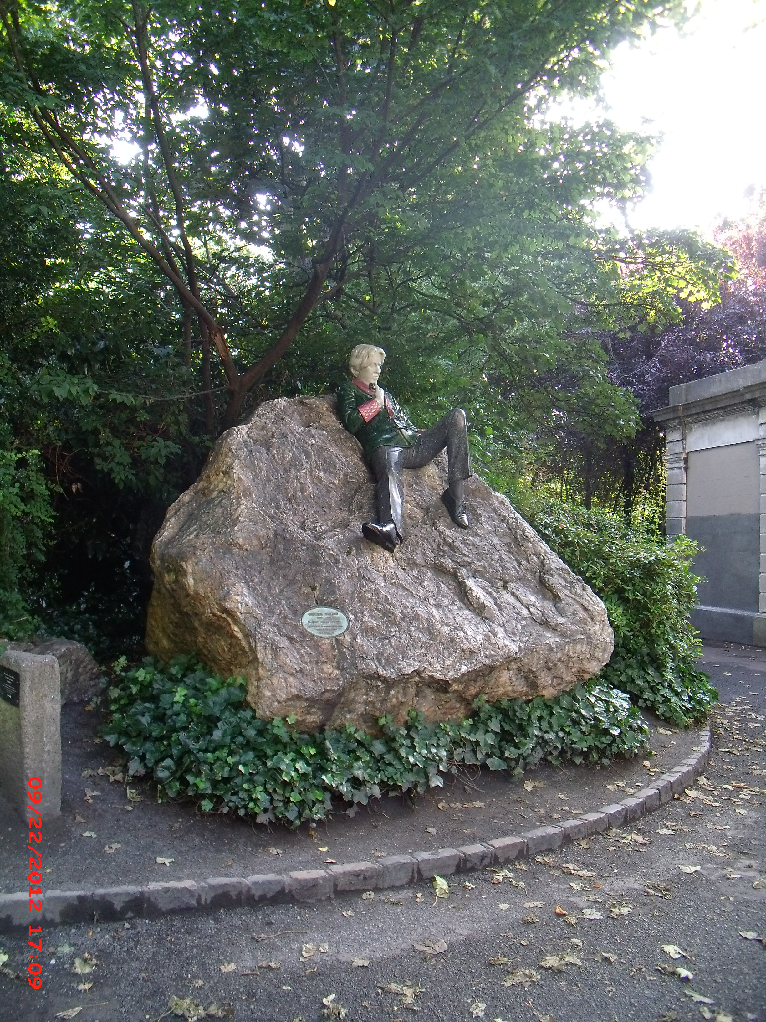 Mémorial à Oscar Wilde à Merrion Square, Dublin, dû à l'artiste Danny Osborn (œuvre inaugurée en 1997).